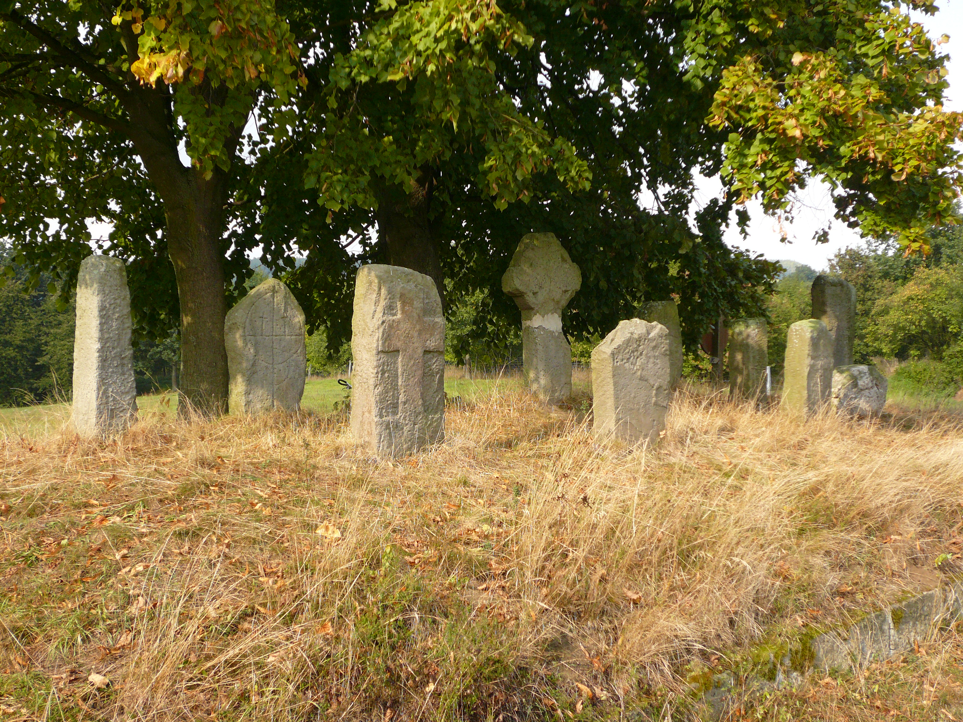 Kreuzsteinnest bei Bühren, Samtgemeinde Dransfeld, Landkreis Göttingen, Niedersachsen. 10 Kreuzsteine aus dem Hoch- und Spätmittelalter mit unterschiedlichen Kreuzformen und Techniken, 1955 als Gruppe zusammengestellt.